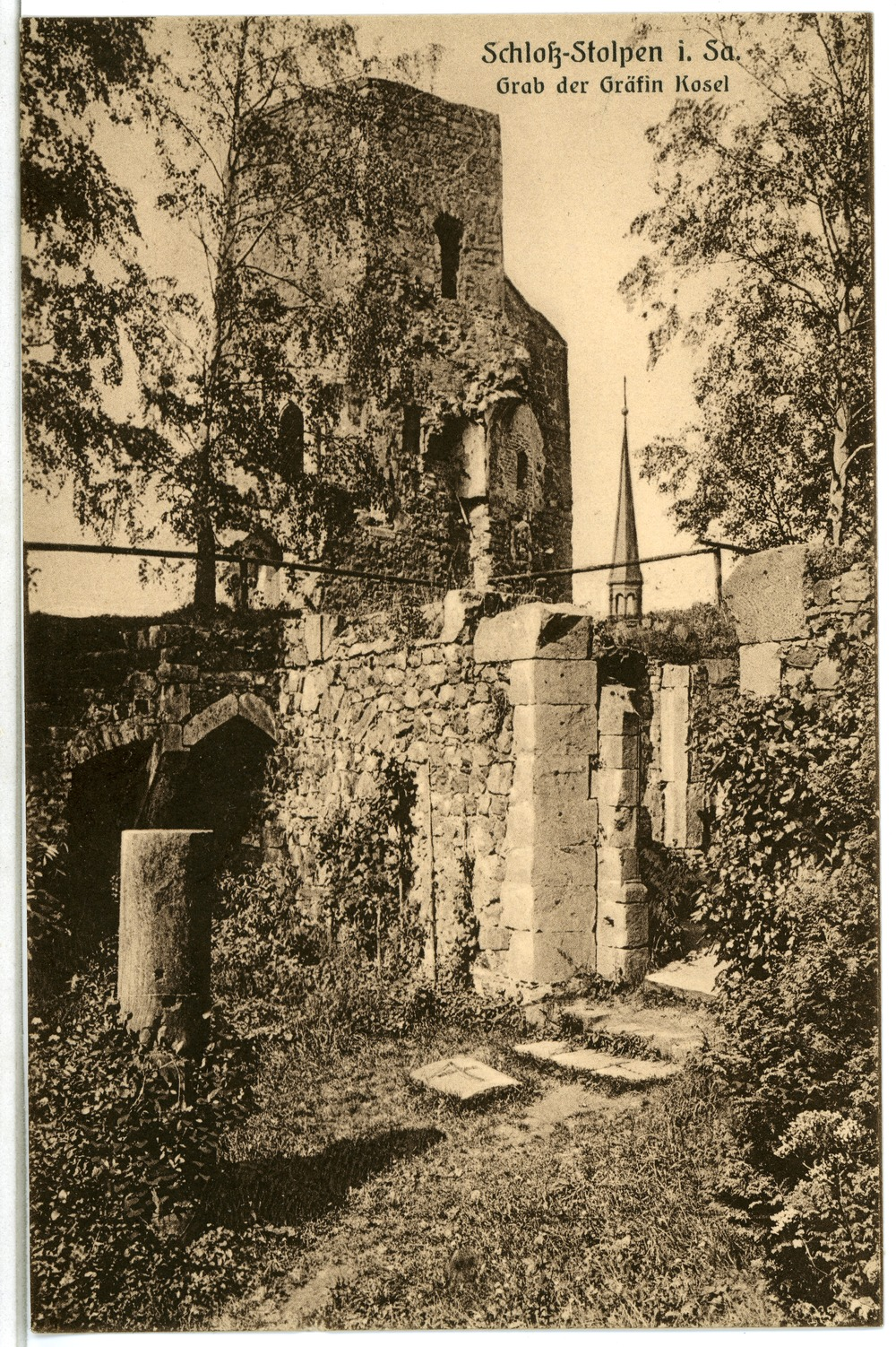 Stolpen; Grab der Gräfin Cosel This postcard is from publisher Brück & Sohn in Meißen ( postcard has a unique number 04469 and is available in a higher resolution at the publisher. This images was uploaded in a cooperation project between Wikipedians and the publisher.